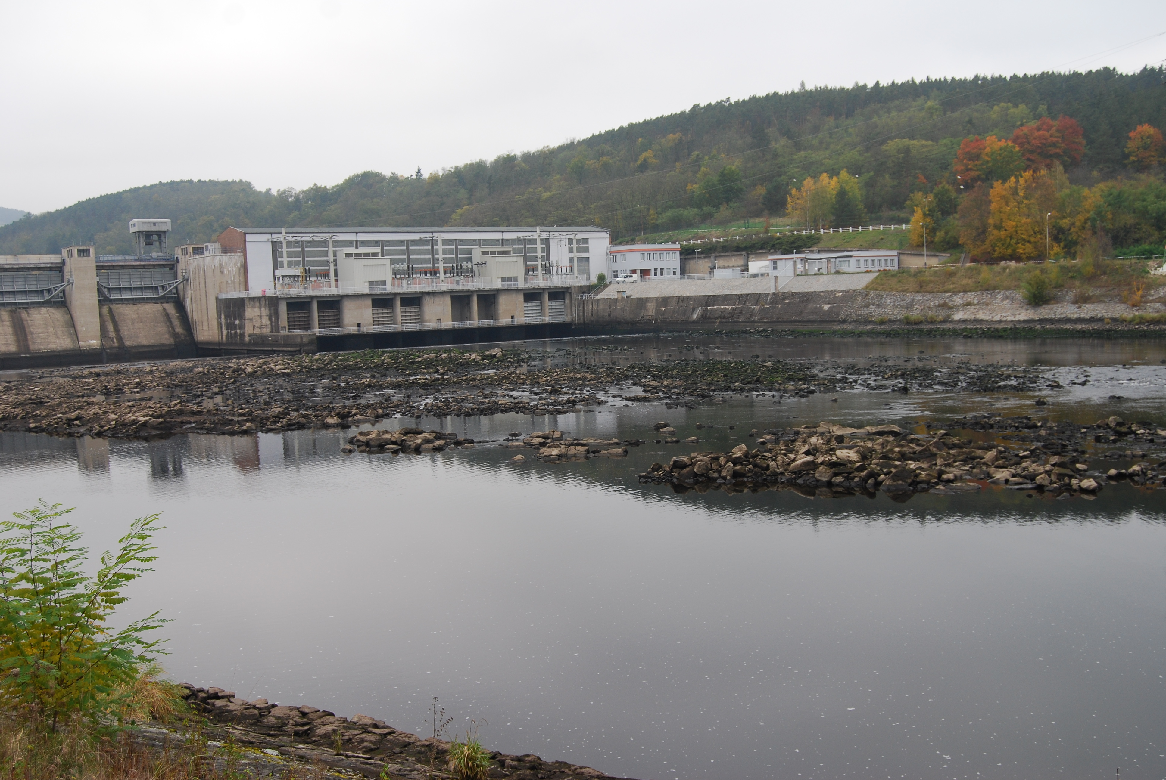 Přehradní hráz. Kamýk nad Vltavou. Okres Příbram. Česká republika.